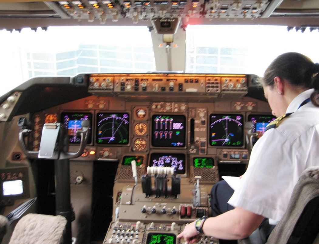 747-400 flight deck